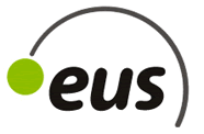 PuntuEus ekimenaren logoa